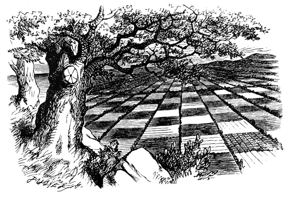 гравюра Джона Тенниела